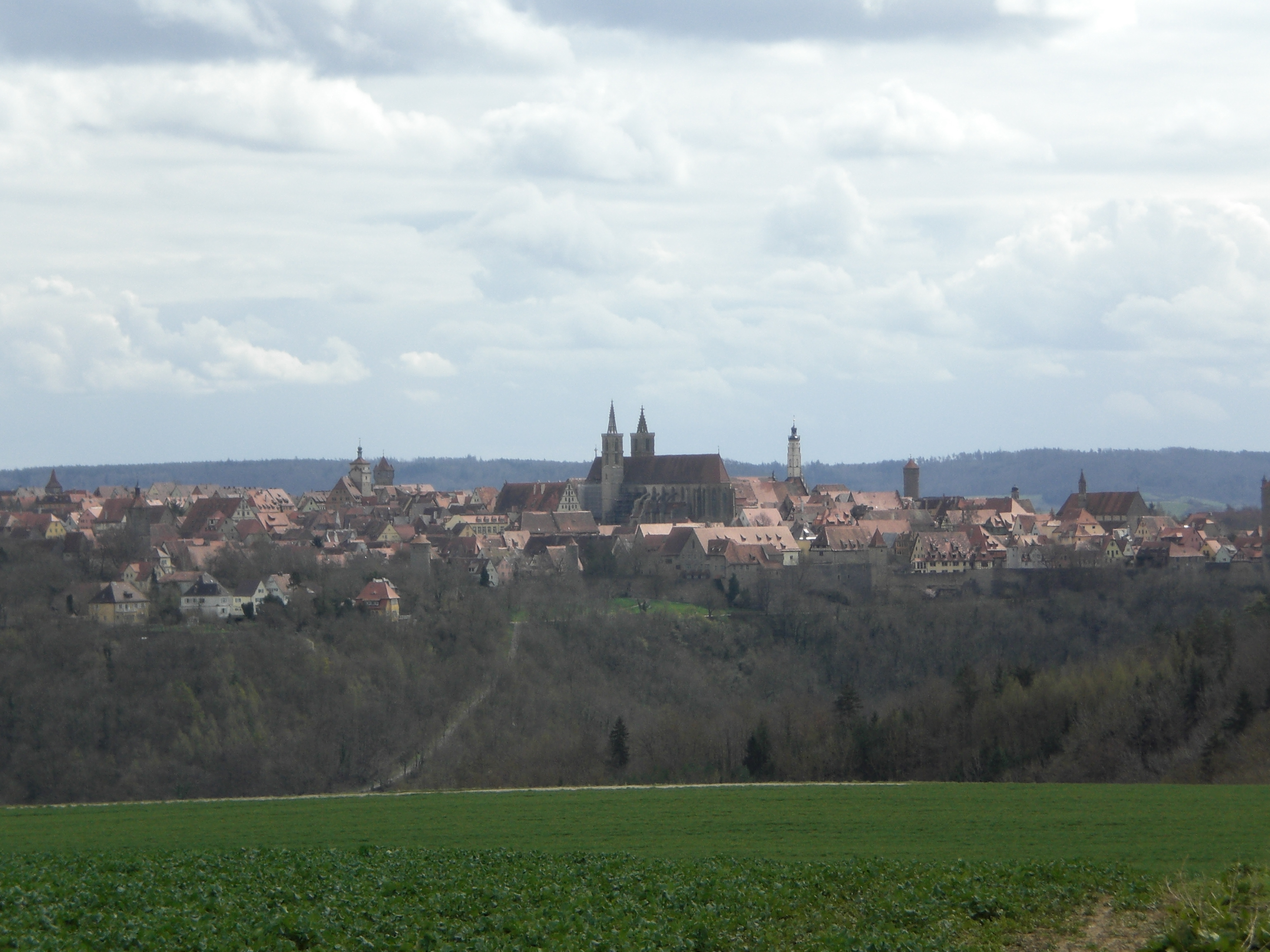 Westl. Ansicht der Stadt Rothenburg o.d.T., Ansbach, Bayern